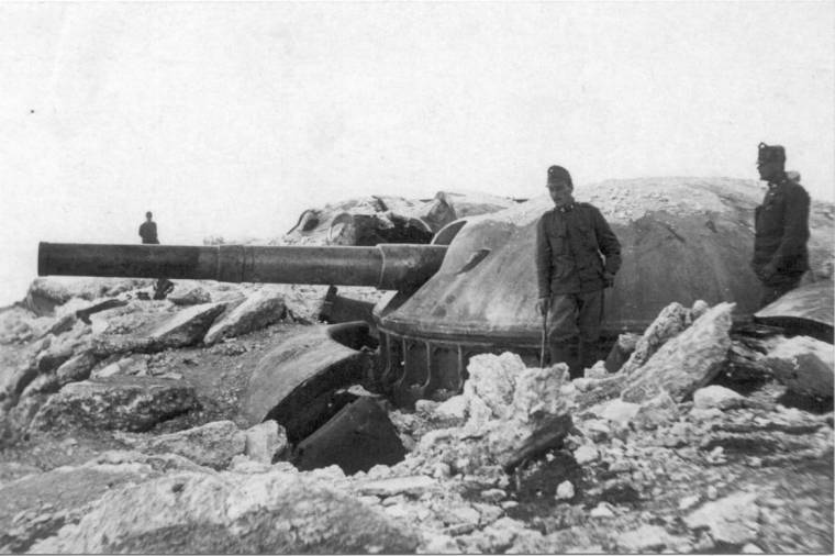 Geschützpanzertum mit 149 mm S Kanone des it. Panzerwerk Verena